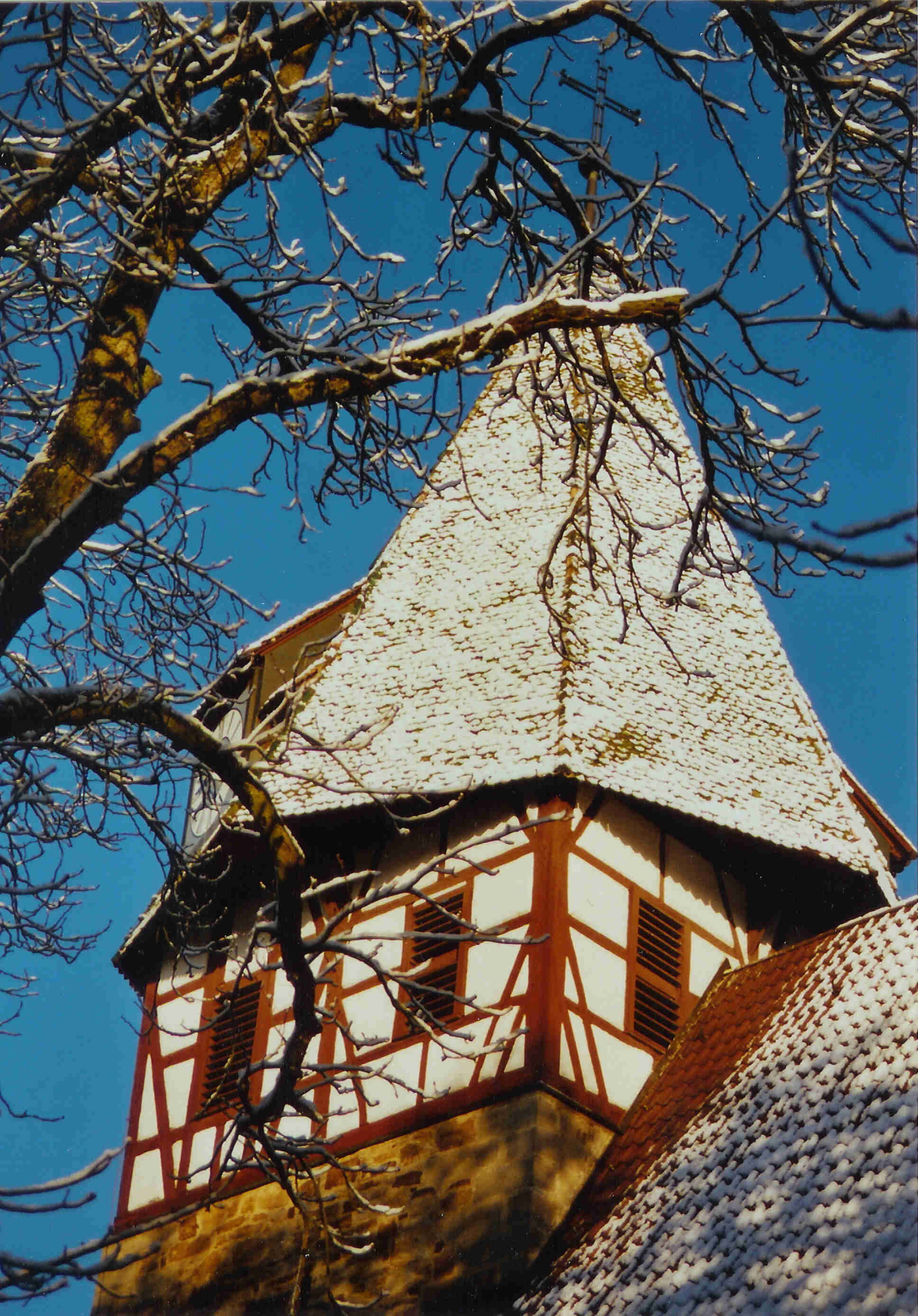 Walddorfhäslach, Evangelische Pfarrkirche Walddorf, Kirchturm Turmhelm im Schnee